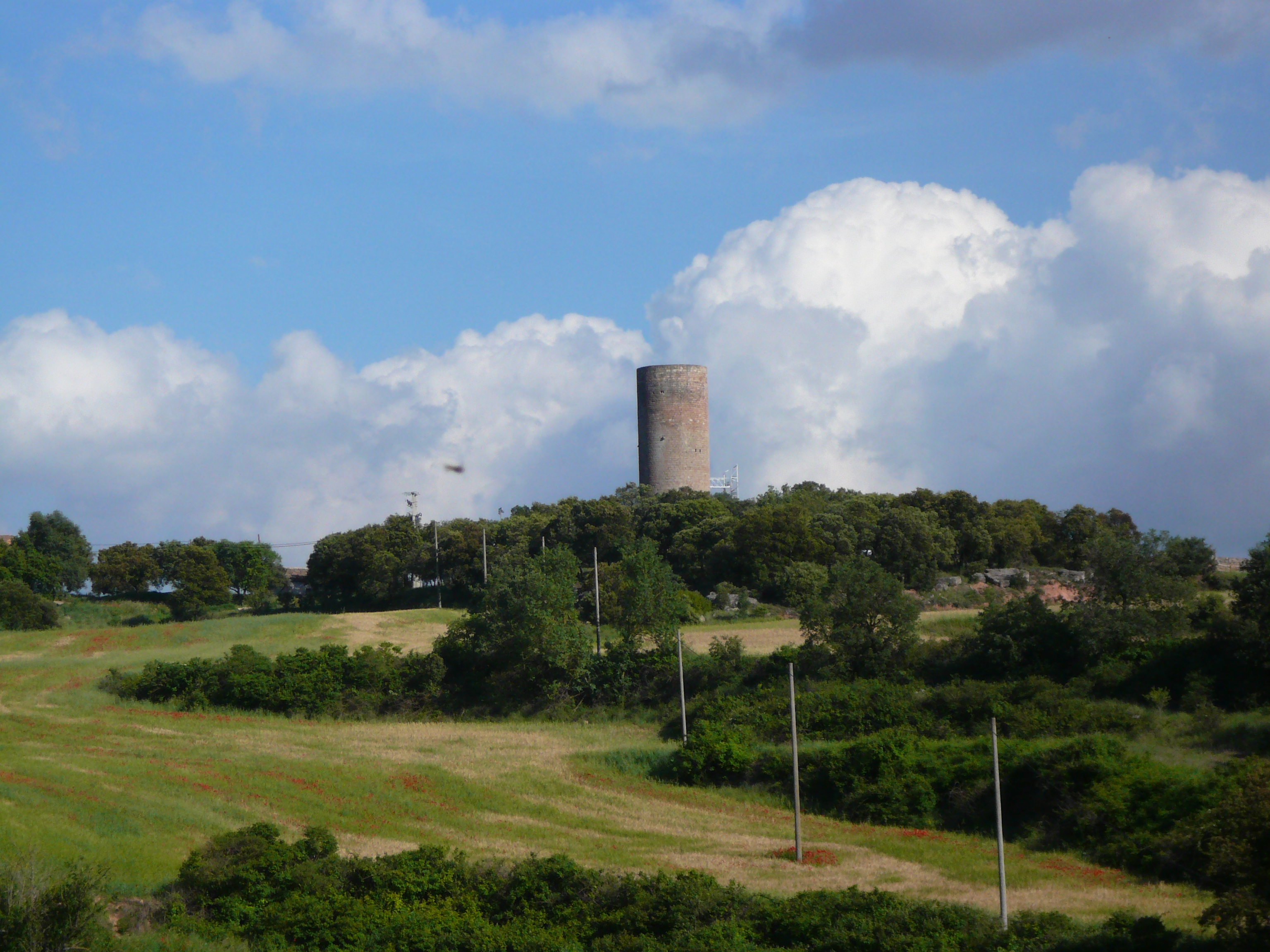 Torre del castell de la Manresana (els Prats de Rei) Object location41° 41′ 48.33″ N, 1° 33′ 07.38″ E